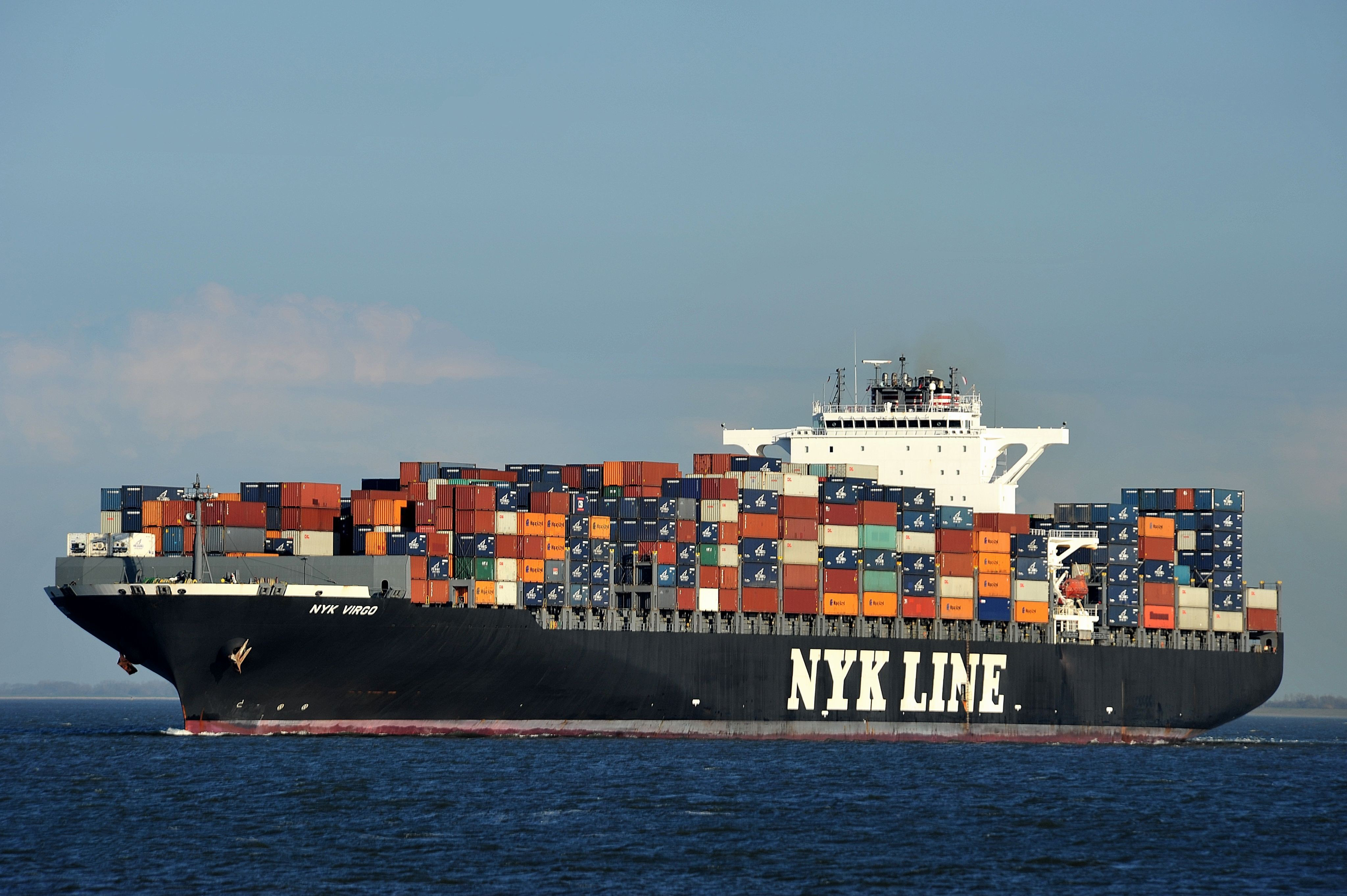 Von See kommend vor Cuxhaven